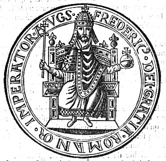 Fridrich Barbarossa